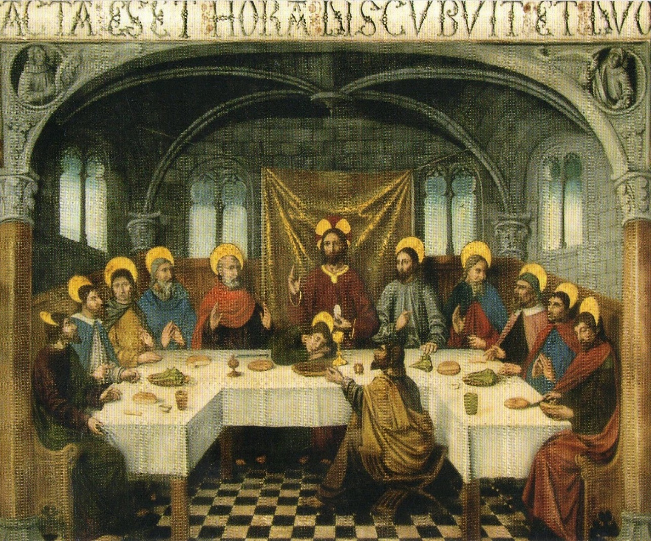 Última cena, pintura mural; monasterio de Santa Isabel de los Reyes, Toledo